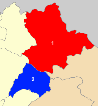 Χάρτης των ενοτήτων (και πρώην δήμων) από τις οποίες αποτελείται ο Δήμος Παρανεστίου. Παρανεστίου Νικηφόρου